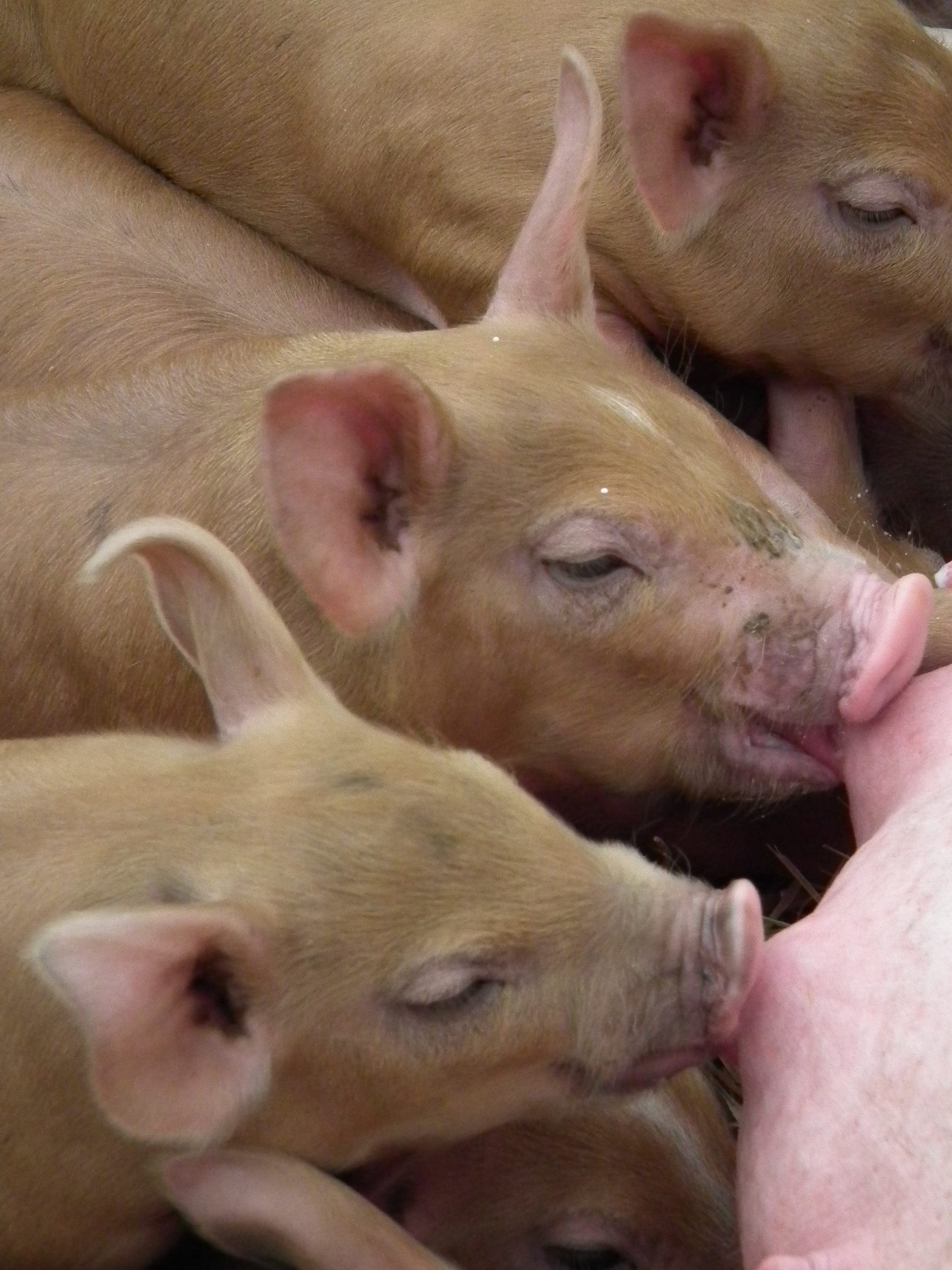 Saugende Ferkel German Piétrain